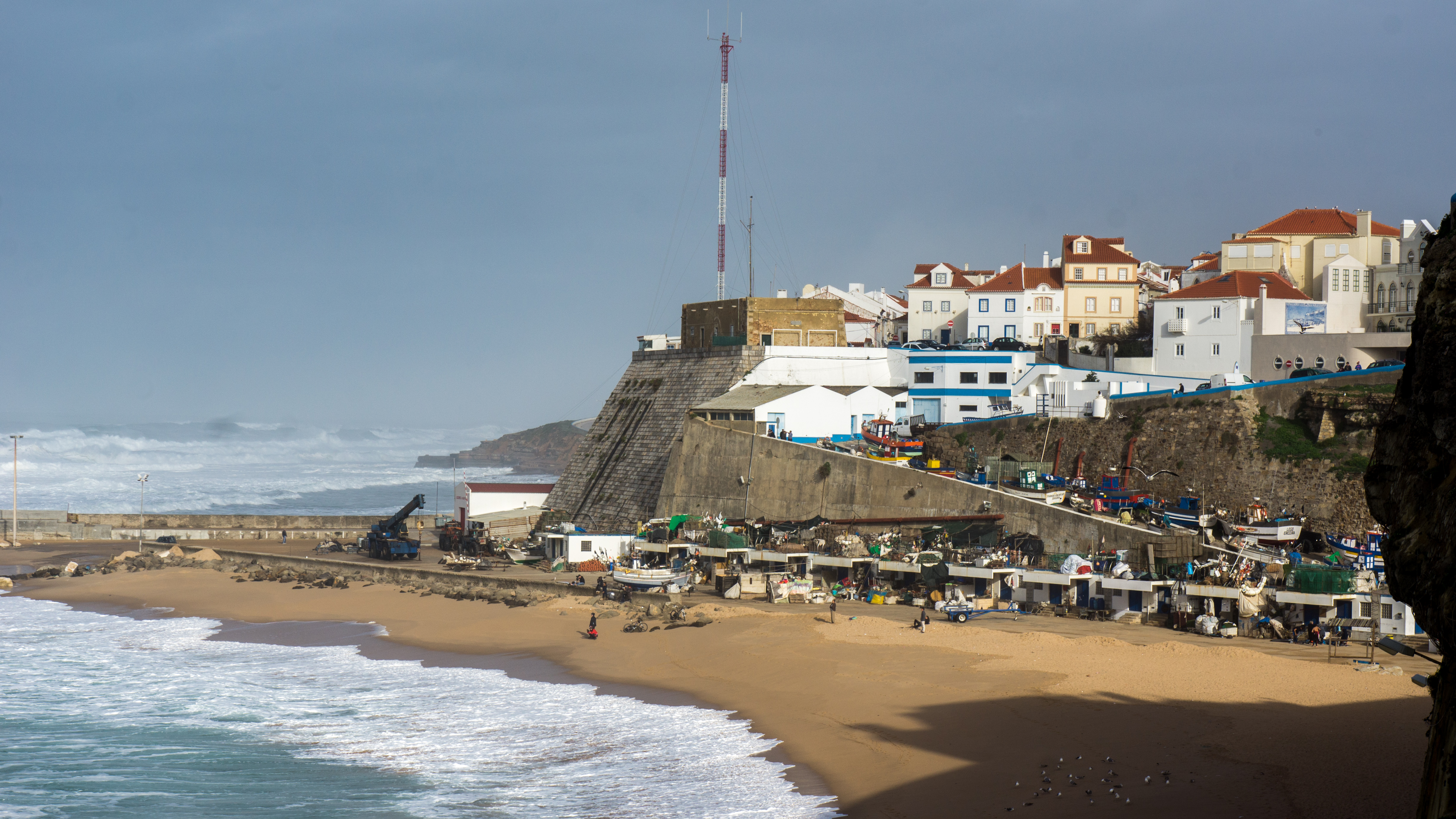 Ericeira